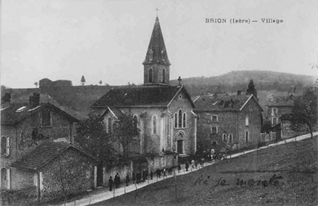 Village de Brion, Isère, AuRA, France. Carte postale ancienne.